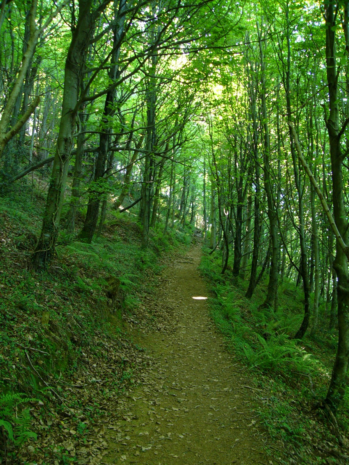 Pagoeta Parke Naturala 1 This is a photography of a Special Area of Conservation in Spain with the ID: ES2120006. Natura2000 entry, EEA entry